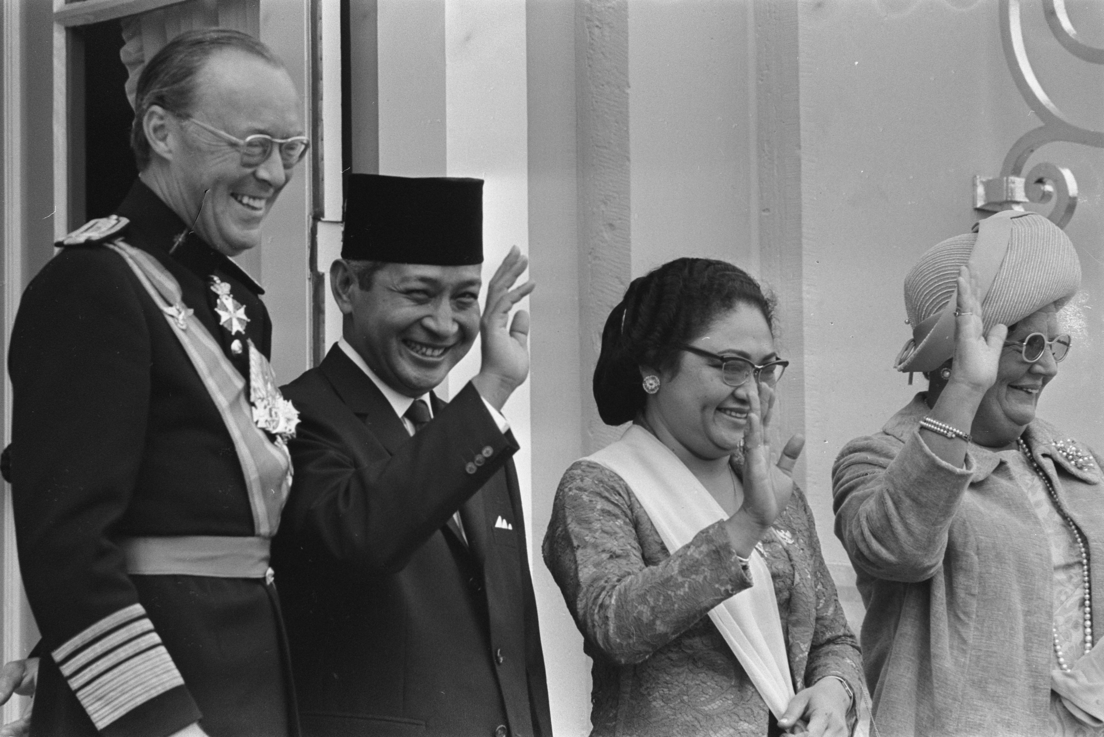 Collectie / Archief : Fotocollectie Anefo Reportage / Serie : [ onbekend ] Beschrijving : President Soeharto op Huis ten Bosch , Den Haag; v.l.n.r. Prins Bernhard, President Soeharto, mevrouw Soeharto, koningin Juliana Datum : 3 september 1970 Locatie : Den Haag, Zuid-Holland Trefwoorden : koninginnen, paleizen, presidenten, prinsen, staatsbezoeken Persoonsnaam : Bernhard (prins Nederland), Juliana (koningin Nederland), Soeharto Fotograaf : Evers, Joost / Anefo Auteursrechthebbende : Nationaal Archief Materiaalsoort : Negatief (zwart/wit) Nummer archiefinventaris : bekijk toegang 2.24.01.05 Bestanddeelnummer : 923-8121